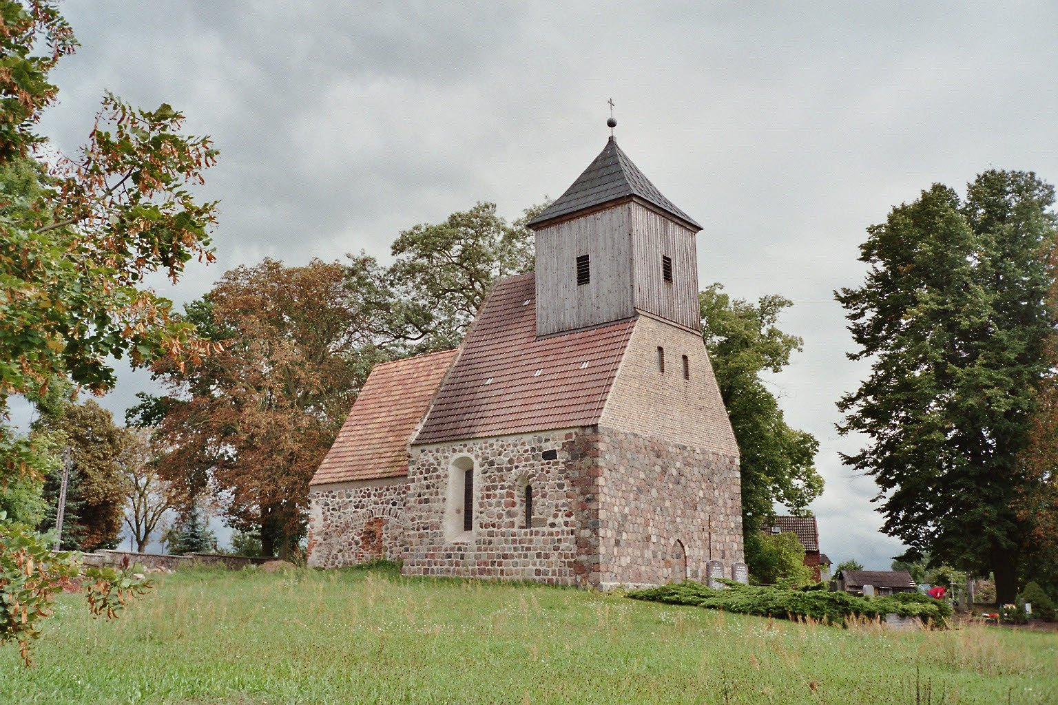 Pfarrkirche in Münchehofe, Deutschland